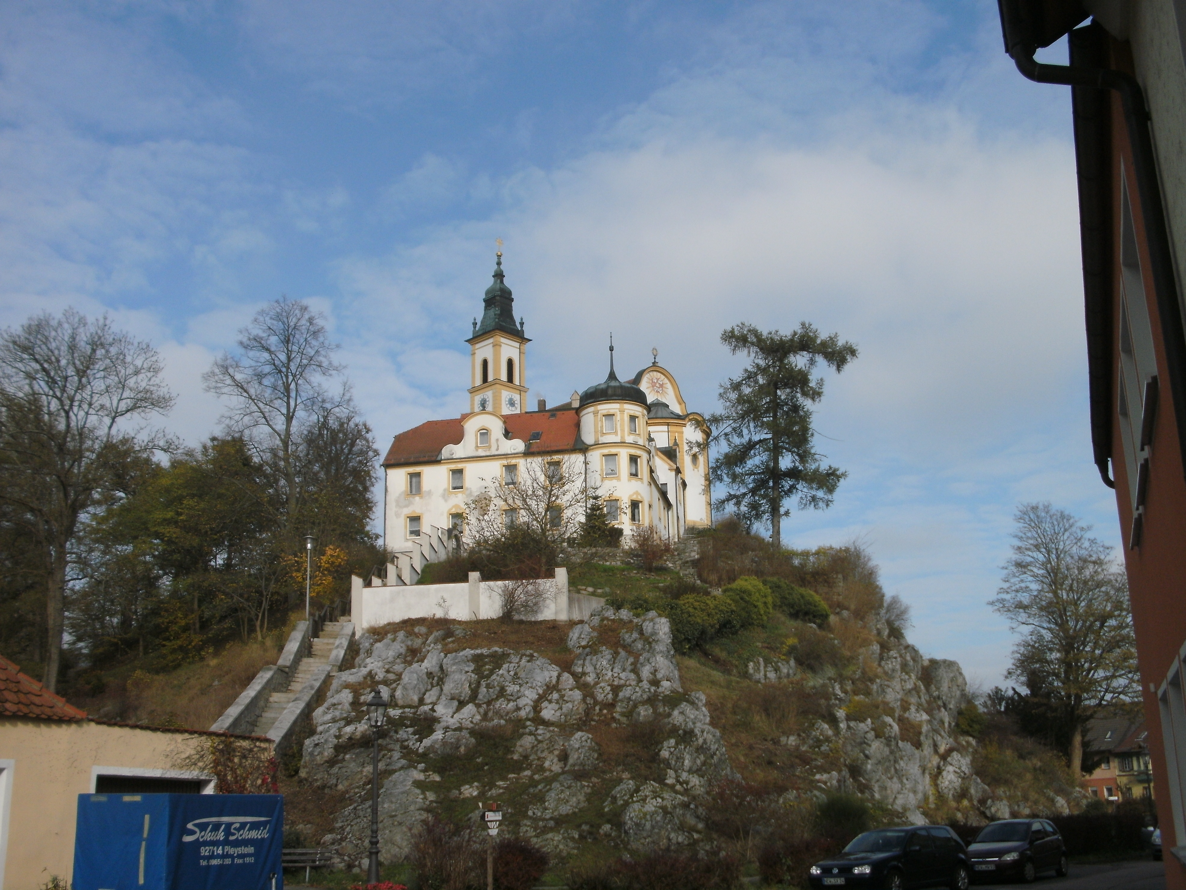 Kreuzberg in Pleystein, Rosenquarzfelsen, Geotop